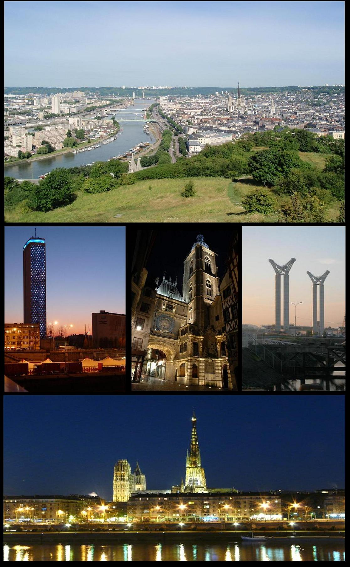 Rouen